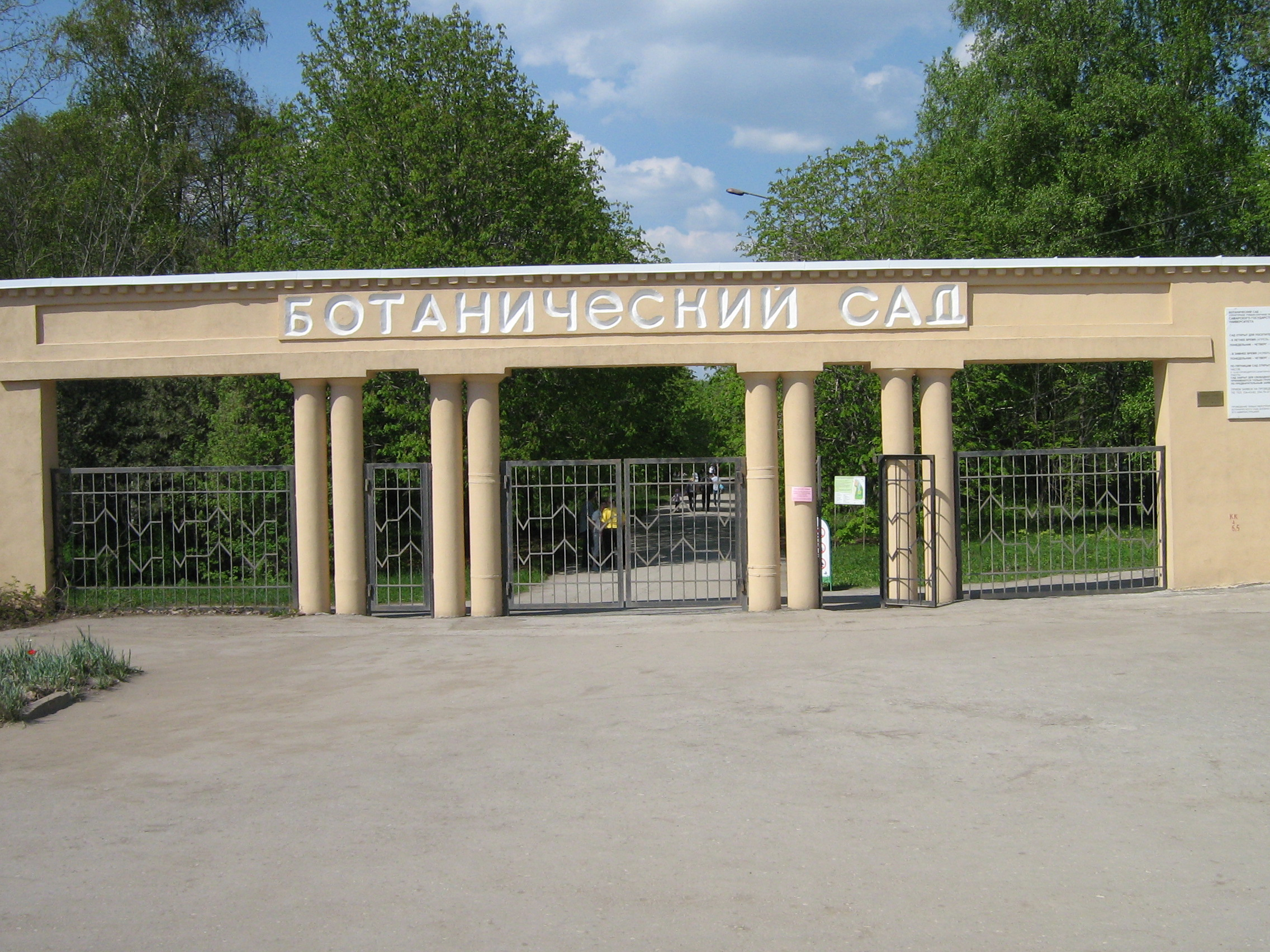 Главный вход в Ботанический сад СамГУ